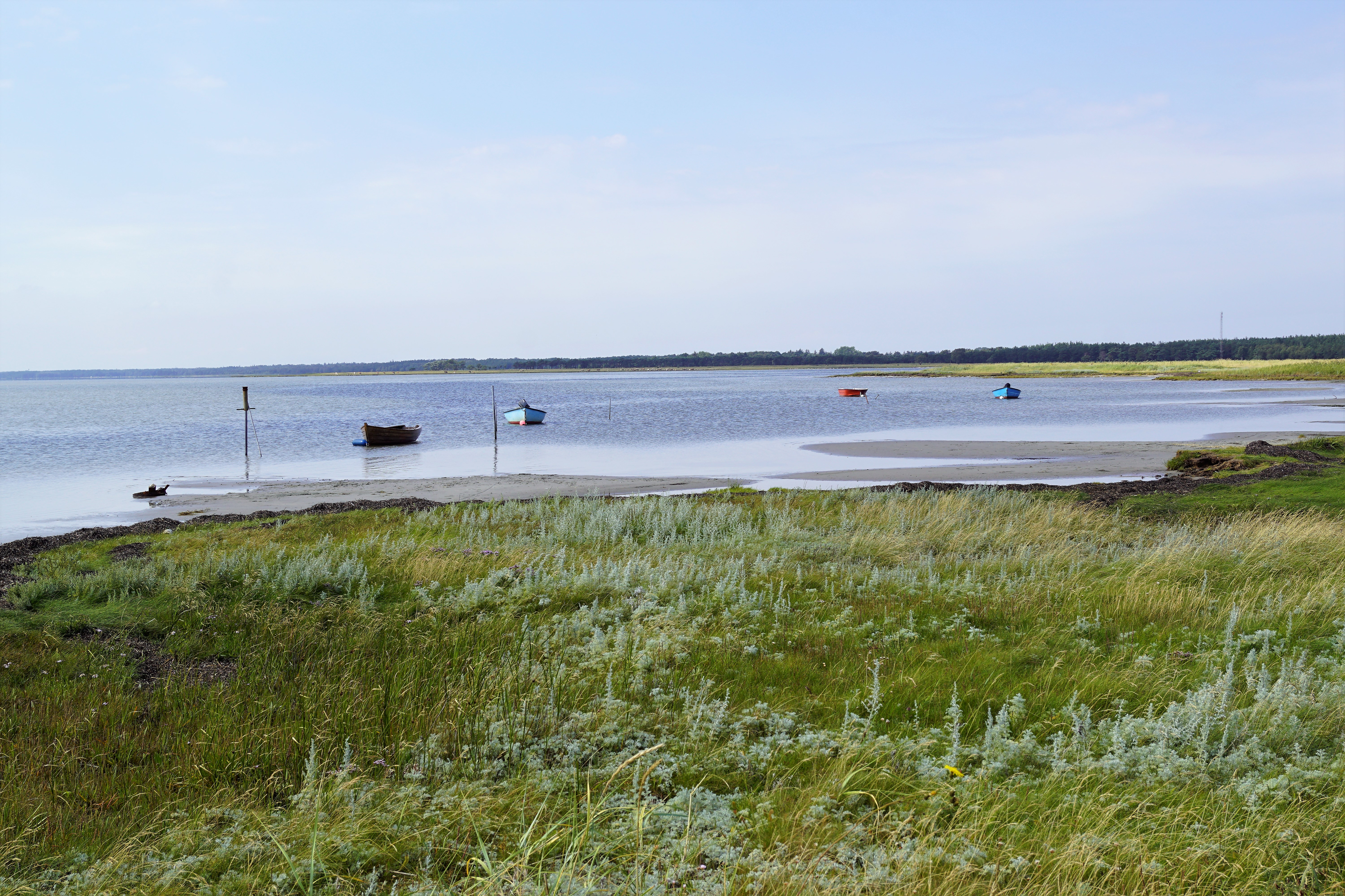 Boven Bugt set fra øst fra Bløden Hale